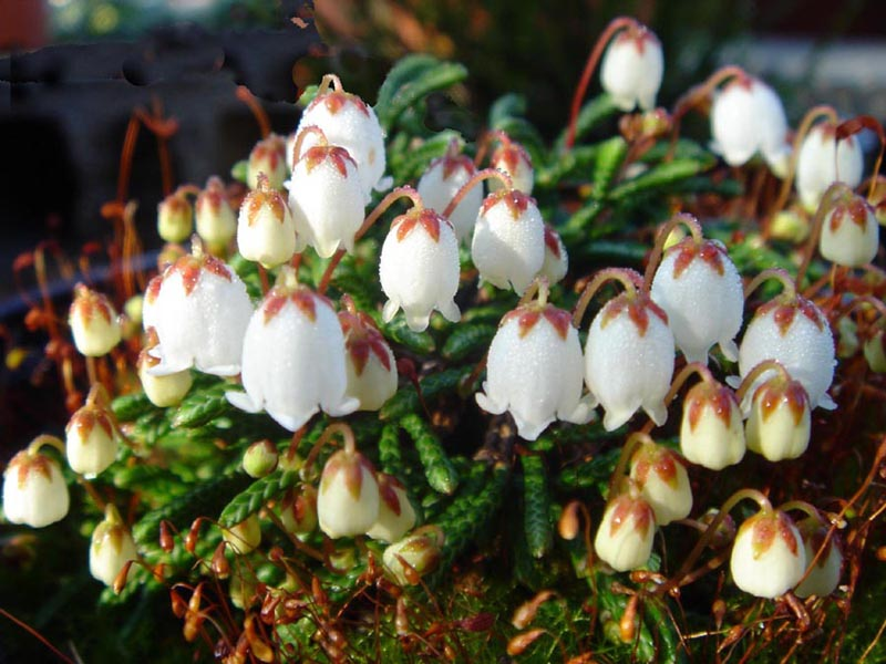 Cassiope lycopodioides 'Jim Lever'